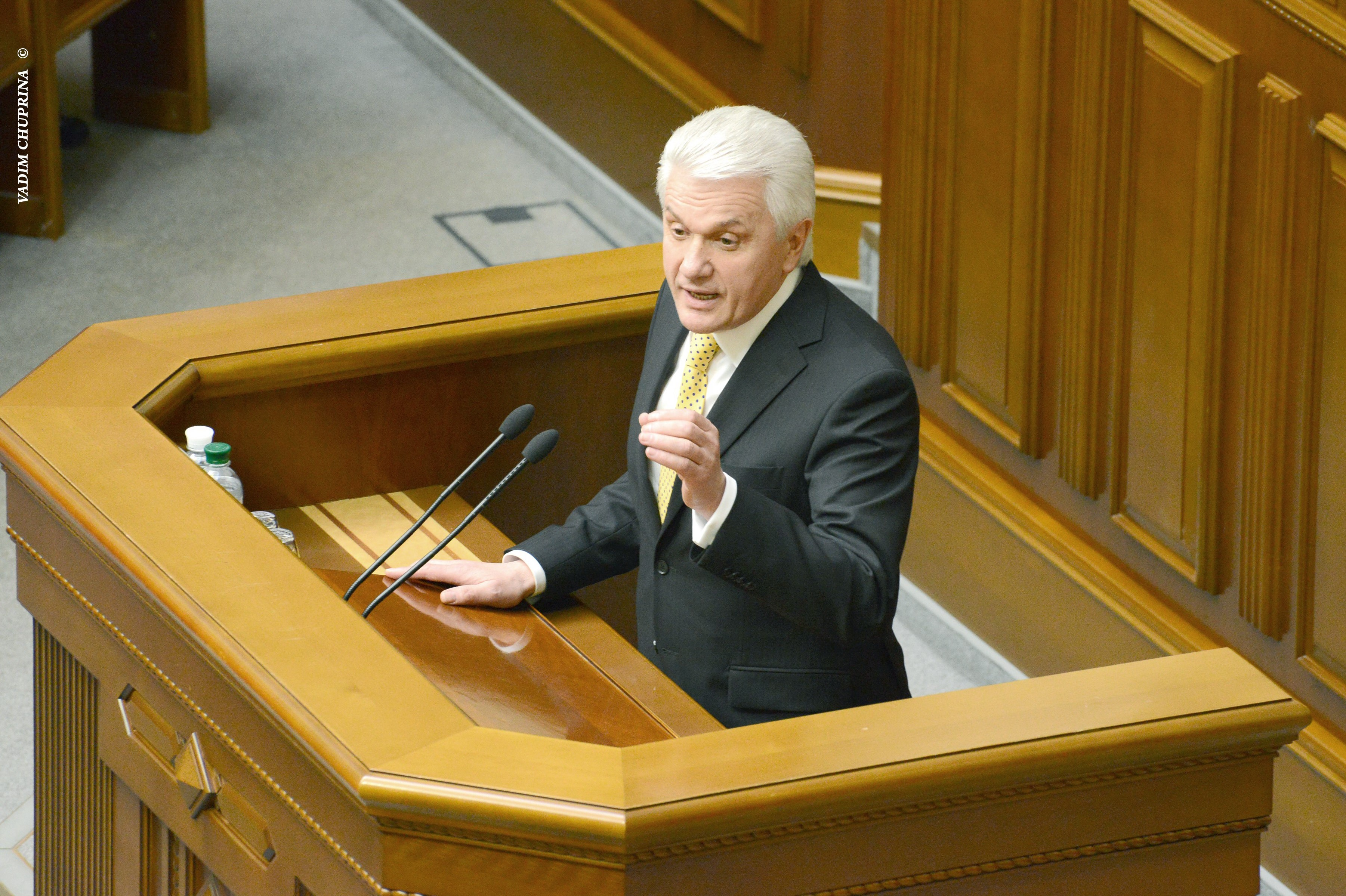 ВЕРХОВНА РАДА УКРАЇНИ 2013 , фото Вадим Чуприна ©